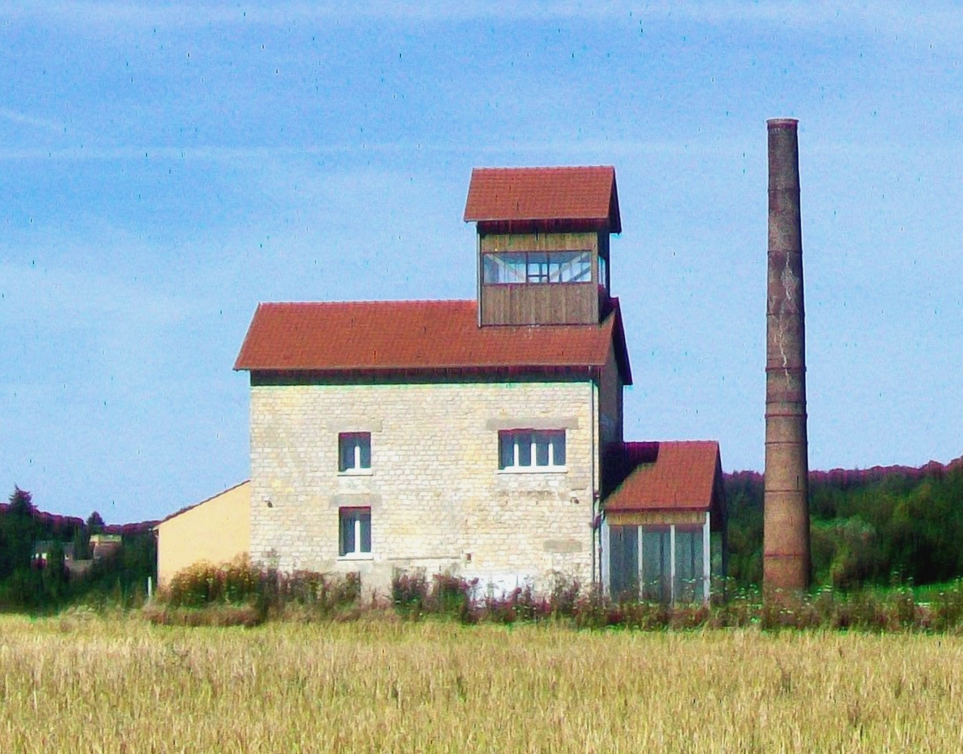 Ancienne distillerie, près de la RD 43.